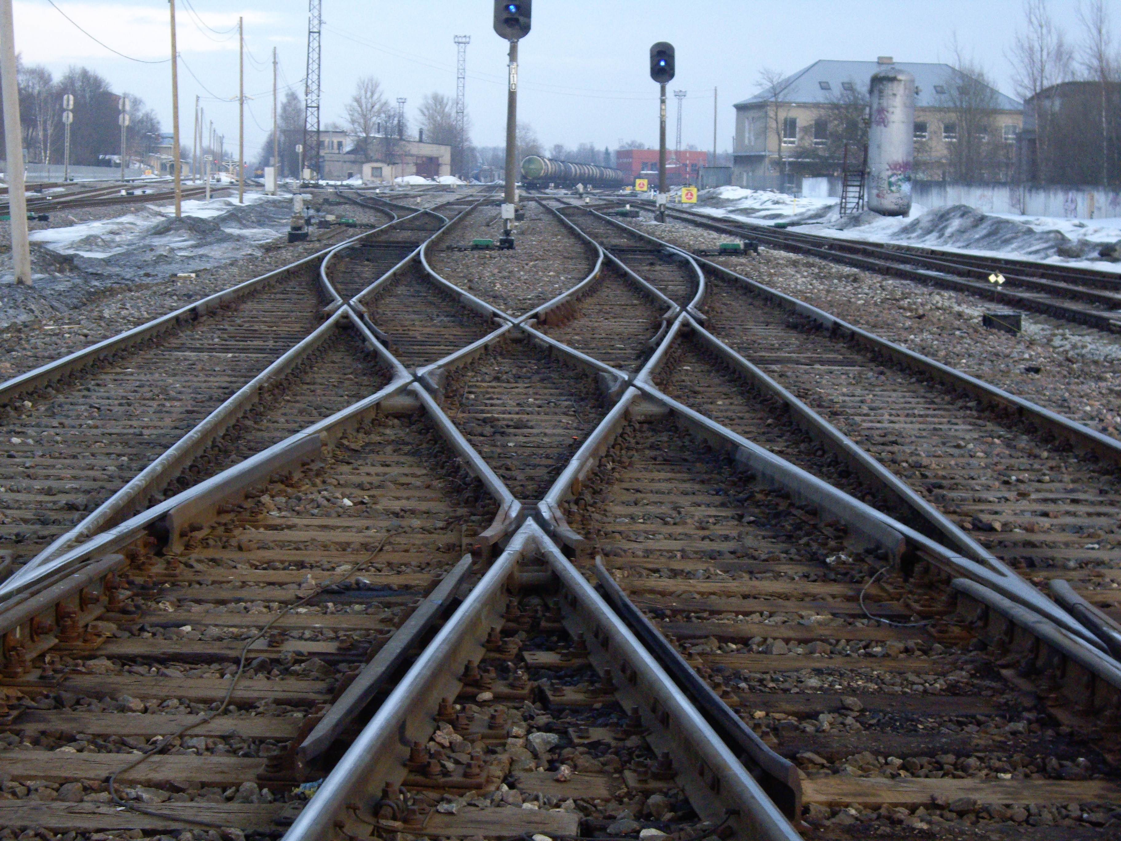 Pöörangute mets Näituse tänava ülesõidu lähedal